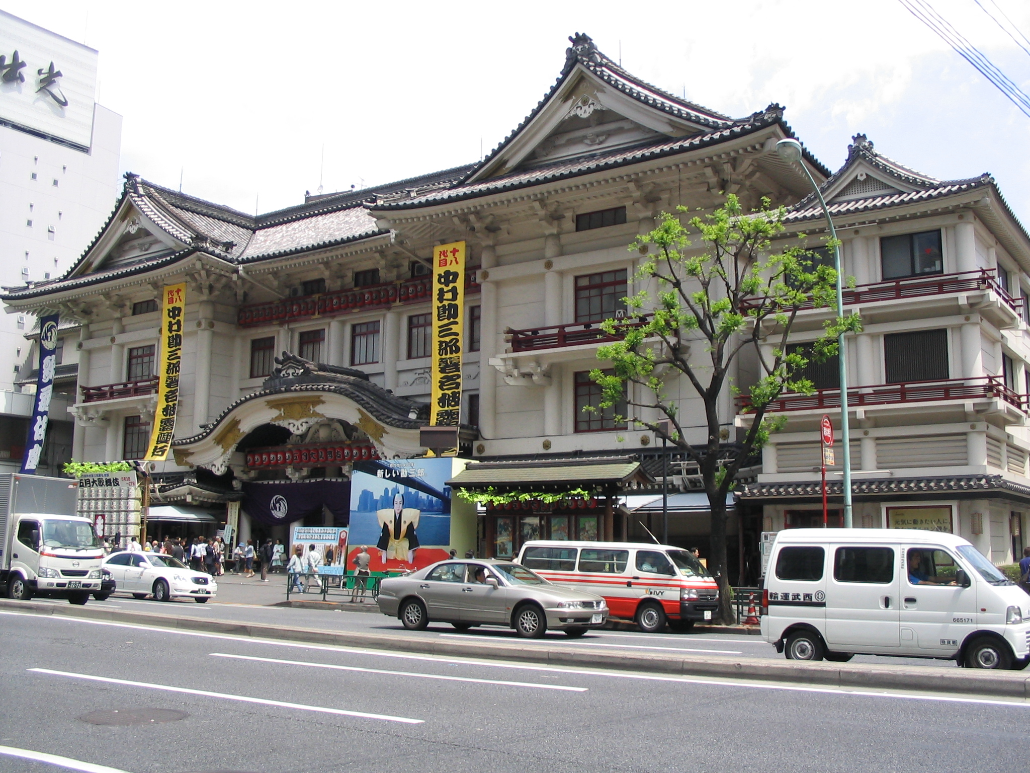 Kabuki-za Theater, Tokyo, Japan